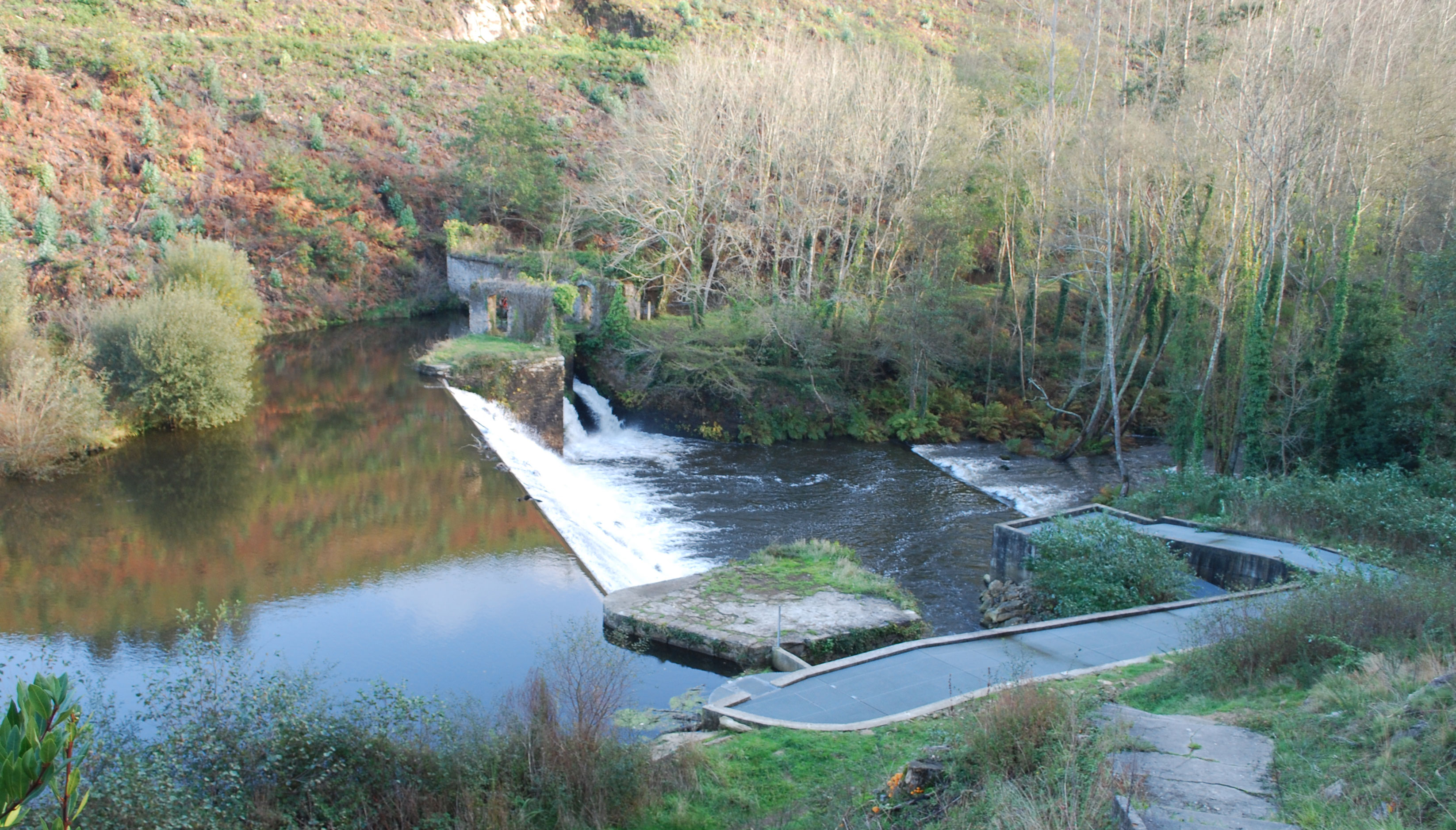 Vista da presa do Rei no río Grande de Xuvia Narón A Coruña Galiza Spain